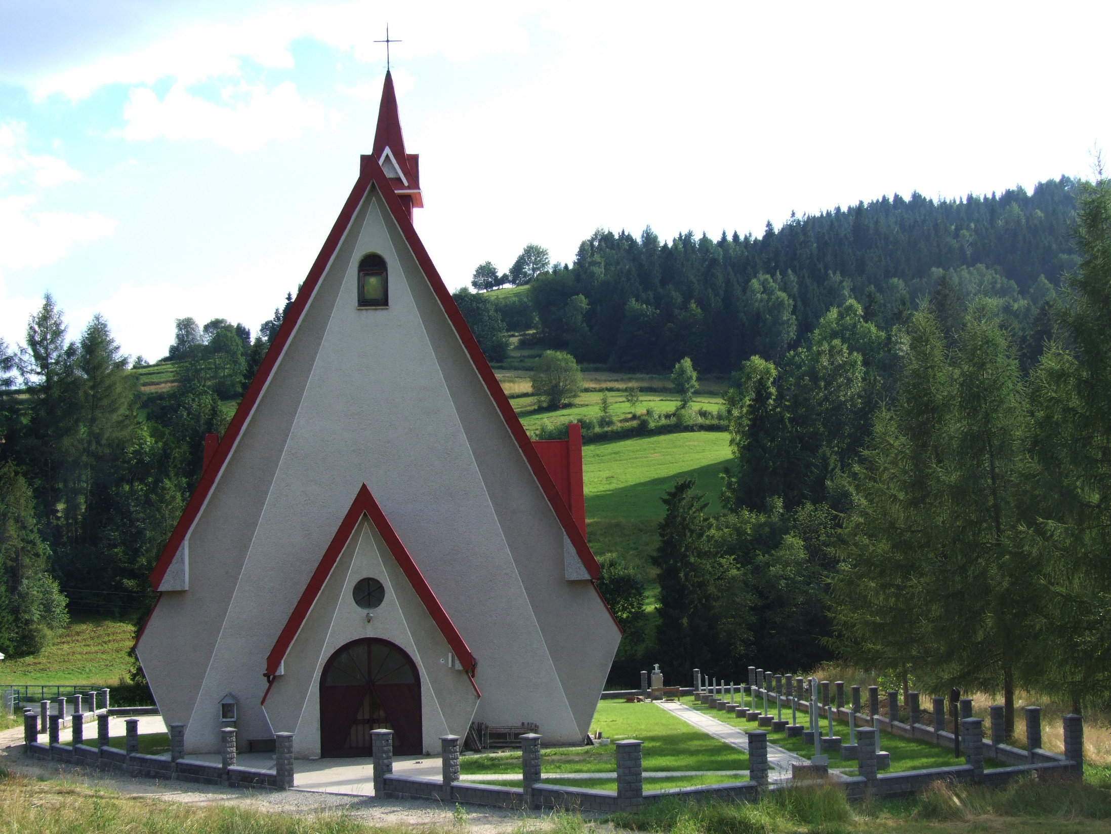 Kościół w Wilczycach